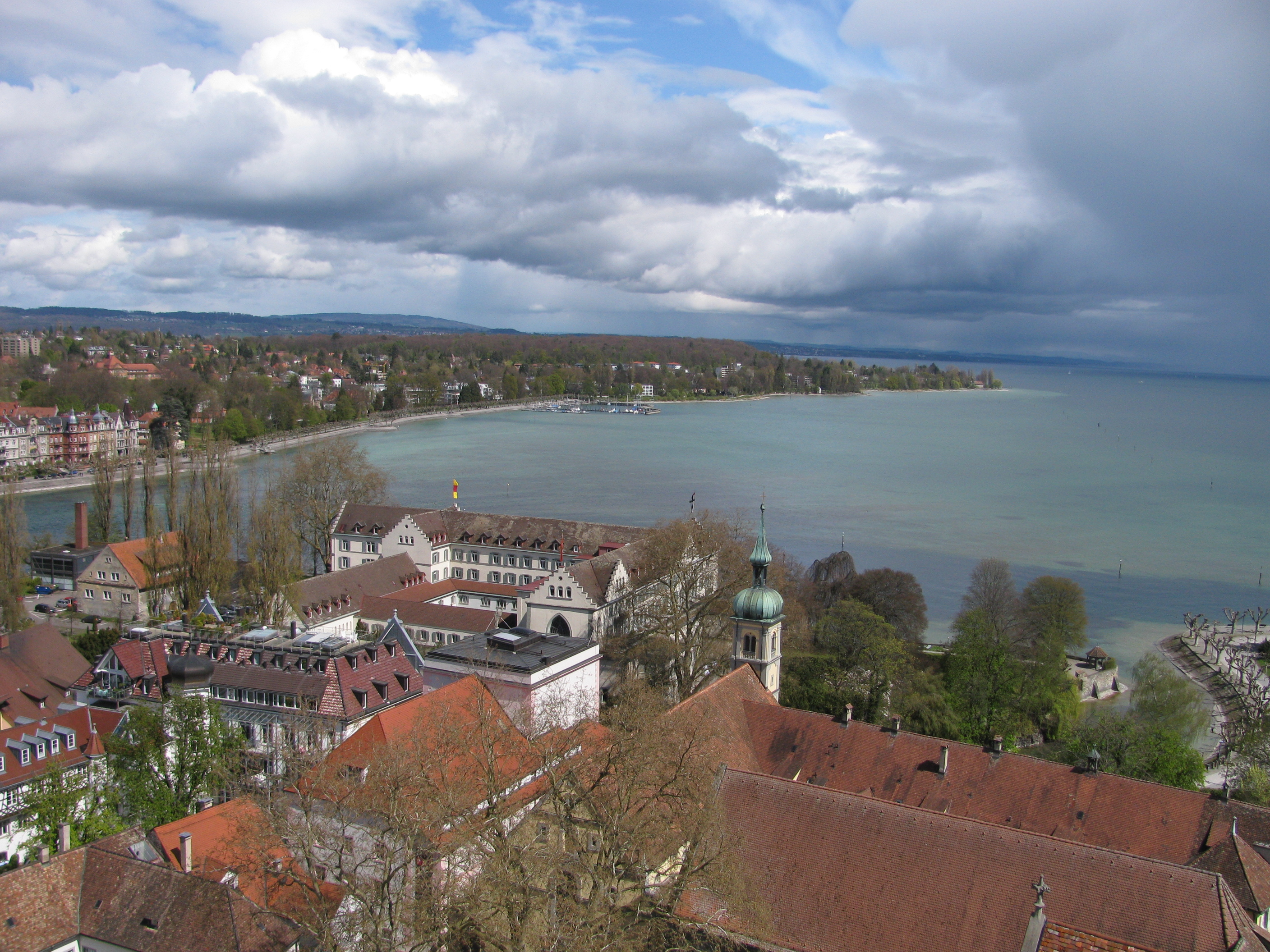 Deutschland (D) - Baden-Württemberg (BW) - Landkreis Konstanz (KN) - Konstanz: Blick über die Altstadt zum Vogelschutzgebiet "Konstanzer Bucht des Bodensees"